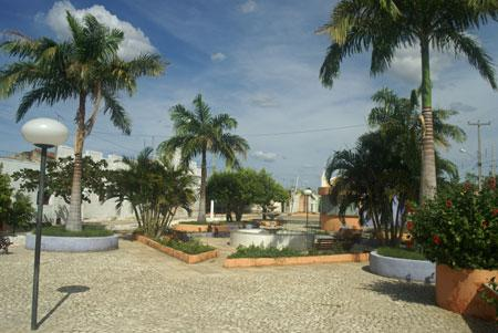 Praça Felipe Neri